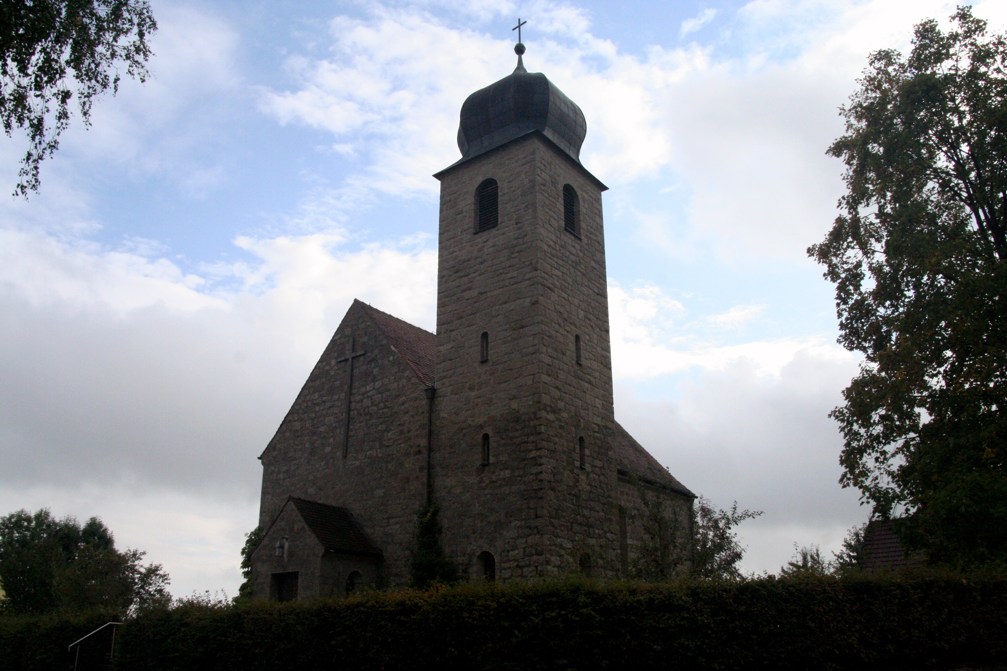 St. Michael Kapelle in AlbersriethThis is a photograph of an architectural monument.